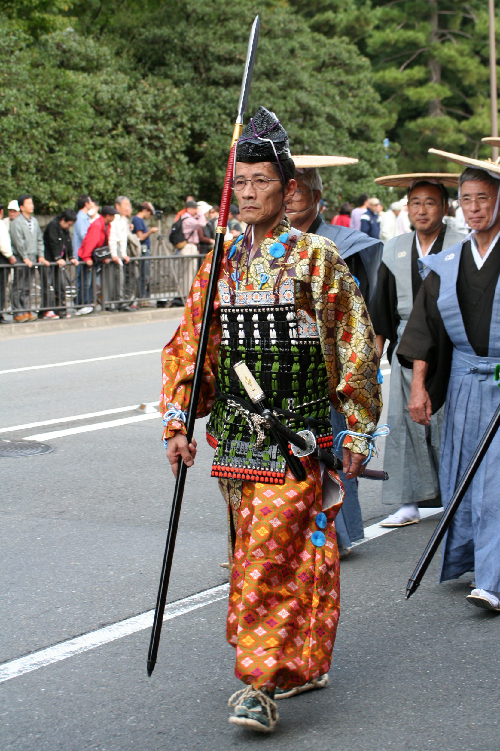 京都府京都市にて開催された時代祭。正午の御所から平安神宮までの行進の様子。2009年10月22日撮影。